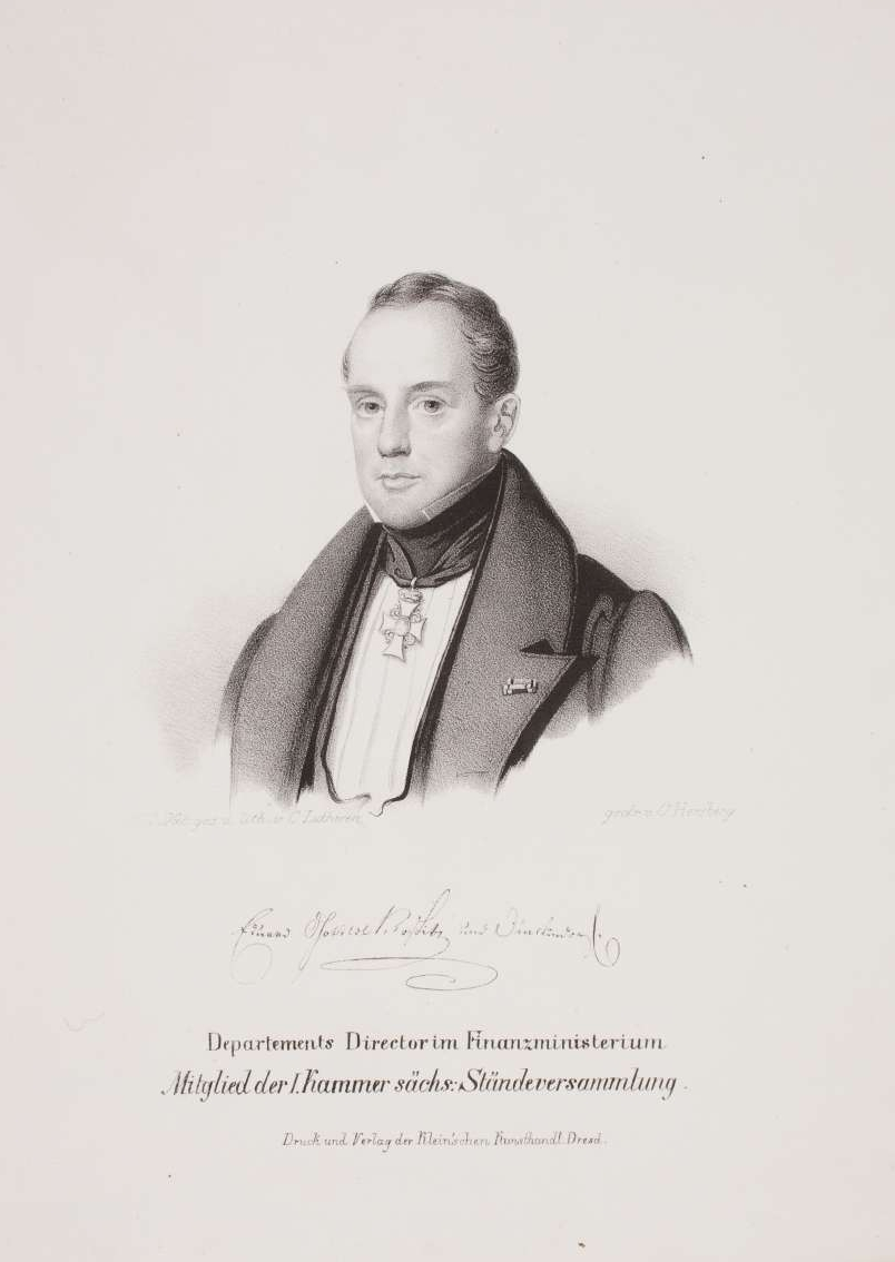 sächsischer Minister, 1791-1858